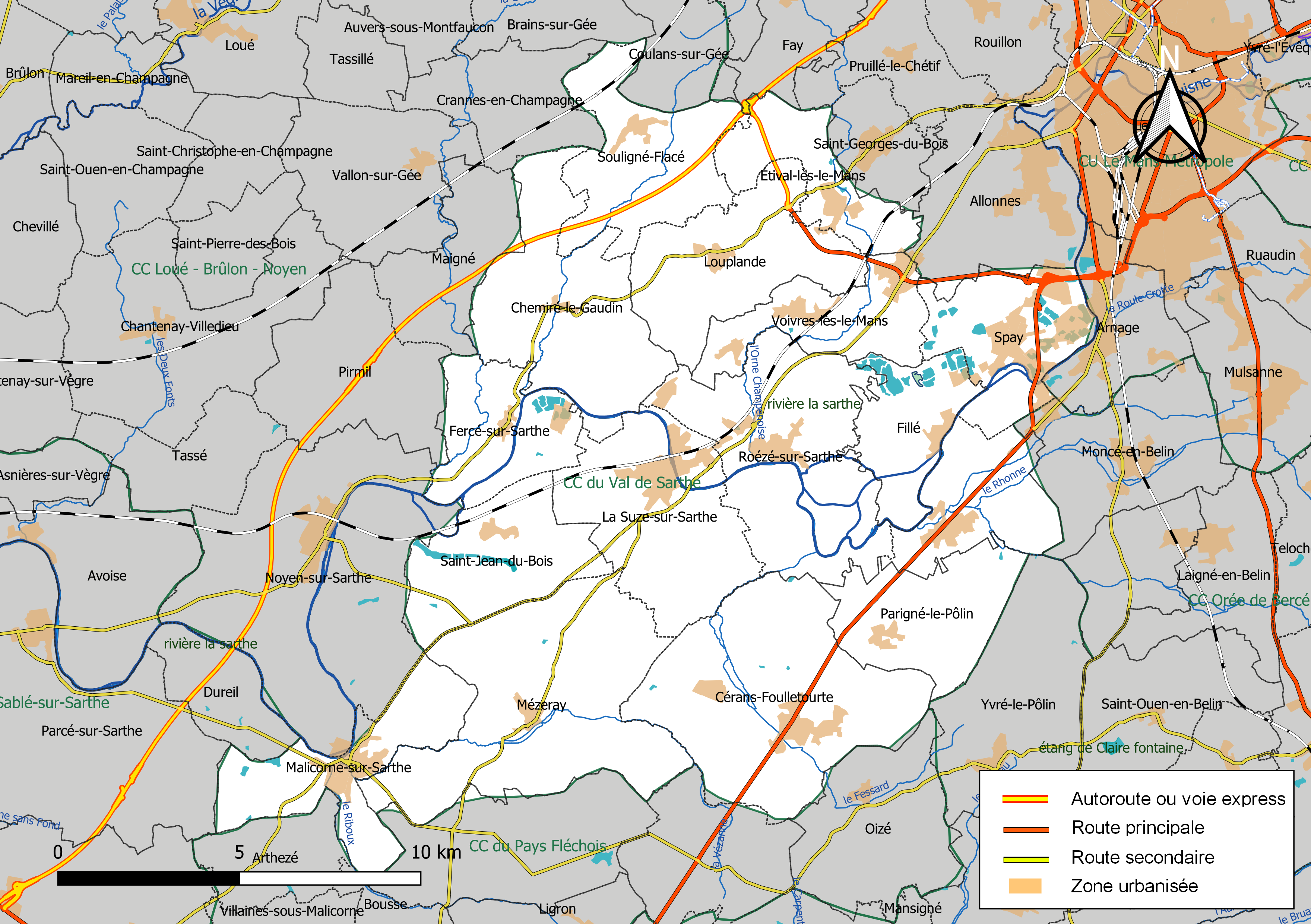 Carte géographique de la Communauté de communes du Val de Sarthe, département de la Sarthe, France. Composition au 1er janvier 2019.